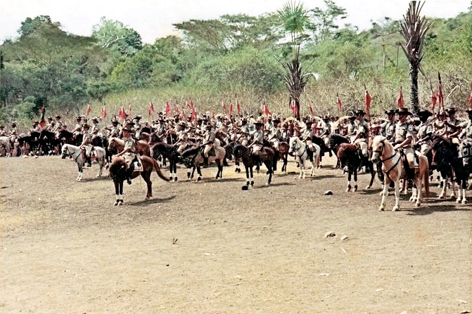 Esquadrão de Cavalaria 6 de Atabae em Huto Buicai